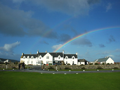 艾拉島空中的雙重彩虹 彩虹是陽光照射到空中的水滴後因折射與反射所造成的光學現象。圖中所見是蘇格蘭艾拉島上的馬克利旅館（Machrie Hotel）上空出現的雙重彩虹。 本圖片是由上傳者User:SElephant本人於2004年8月拍攝。